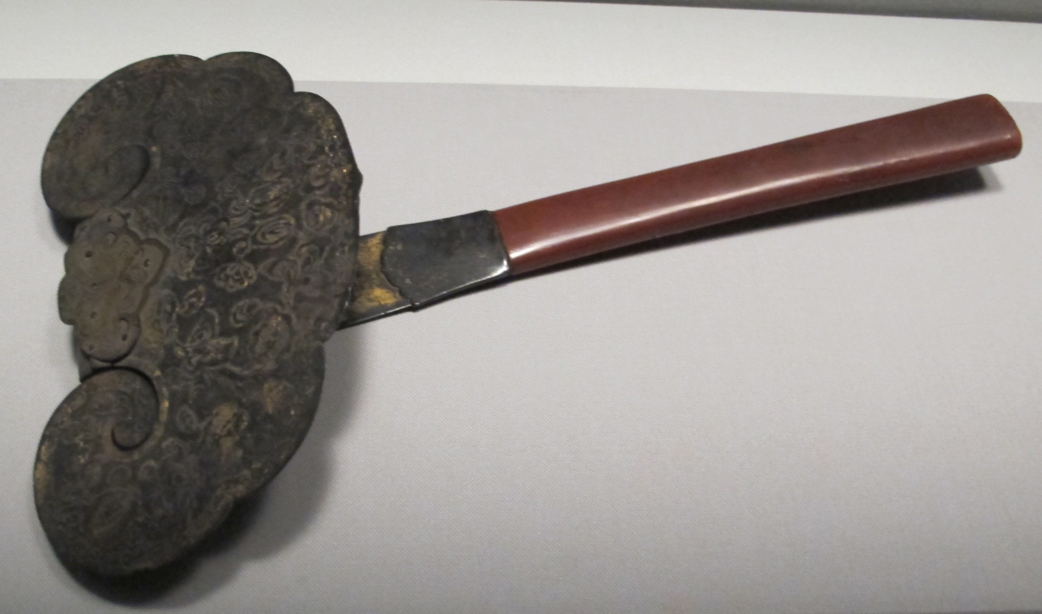 Periodo heian, nyoi (gancio), 957